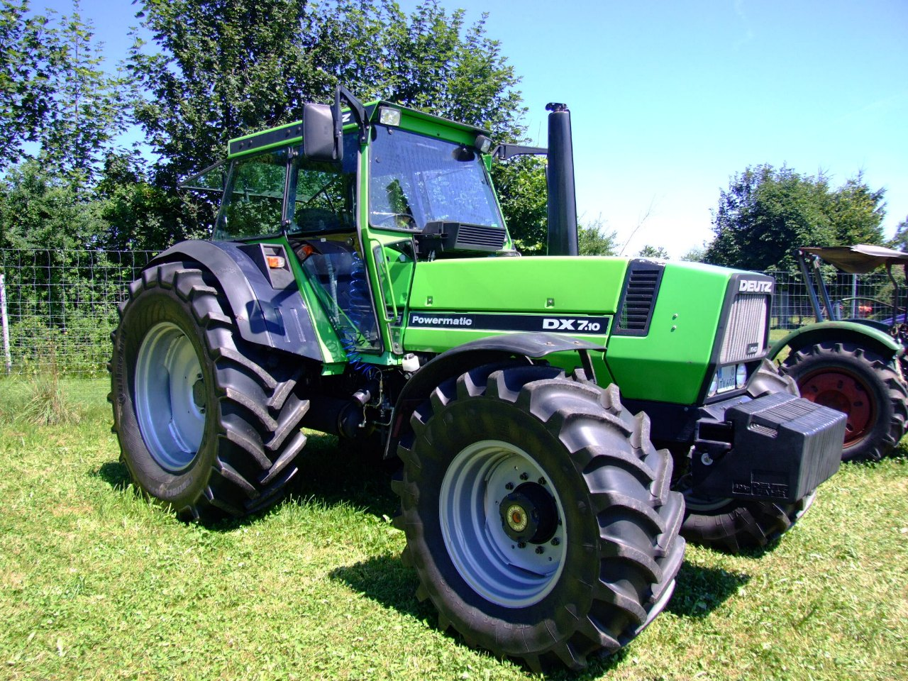 Deutz-Fahr DX 7.10 Powermatic (Beschriftung offenbar nachträglich zu nur „Deutz“ geändert)